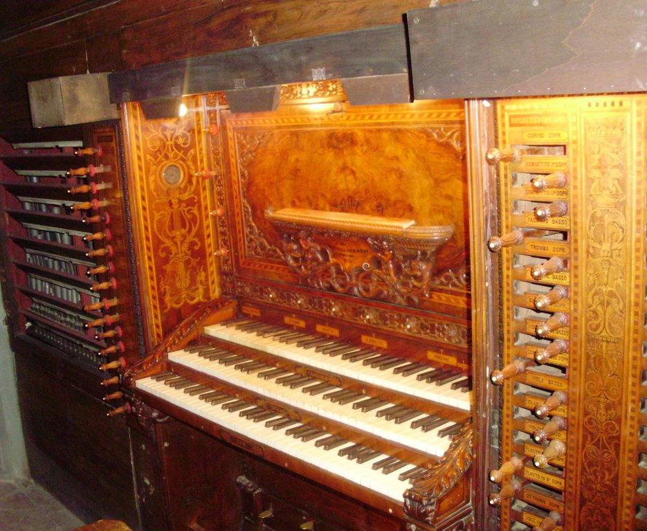 Firenze, Basilica di San Lorenzo: la consolle dell'organo a canne costruito nel 1864-1865 dalla celebre fabbrica d'organi dei Fratelli Serassi di Bergamo.